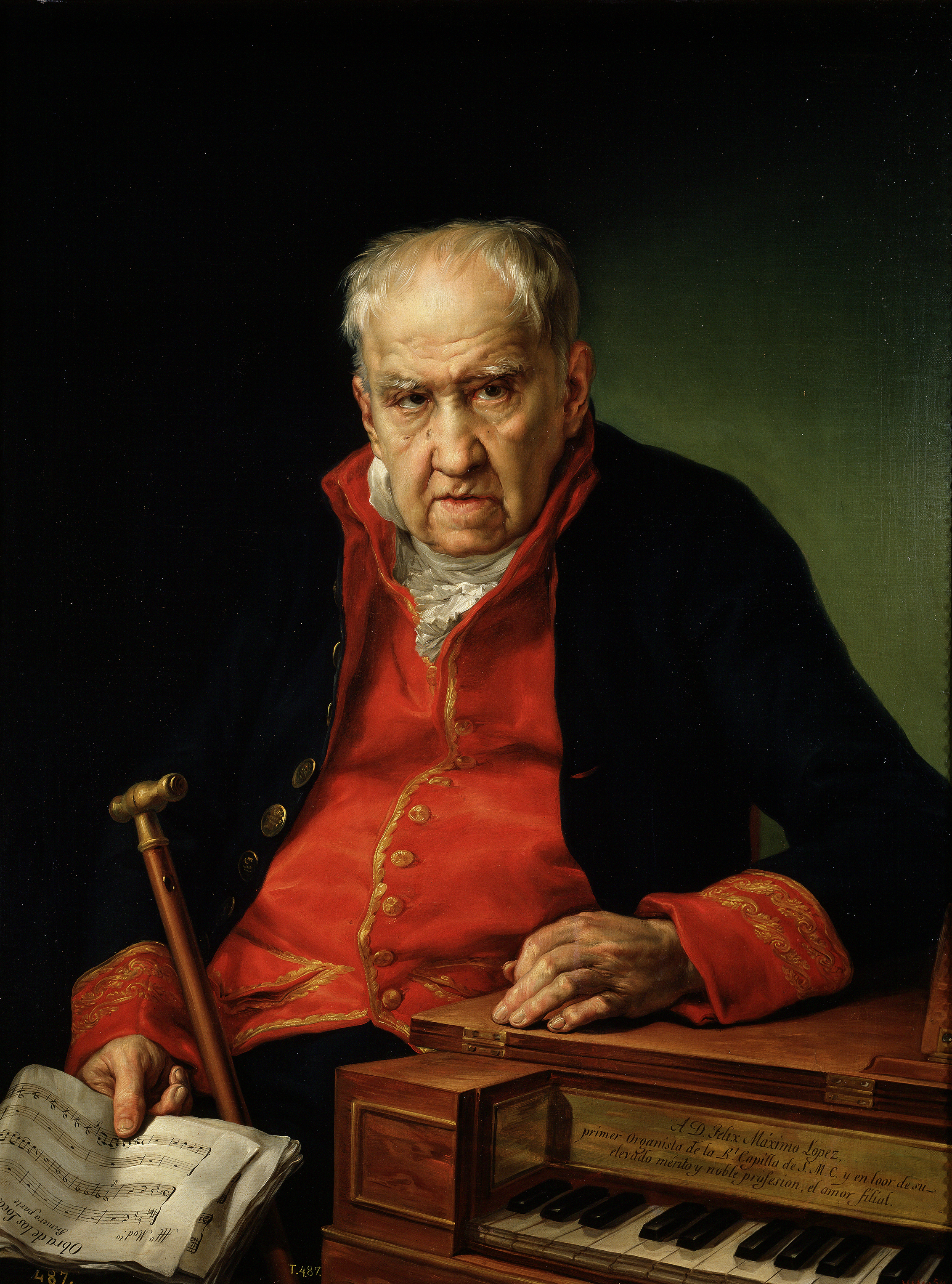 Retrato de Félix Máximo López (1742-1821), que fue un compositor y organista español y primer organista de la Real Capilla.